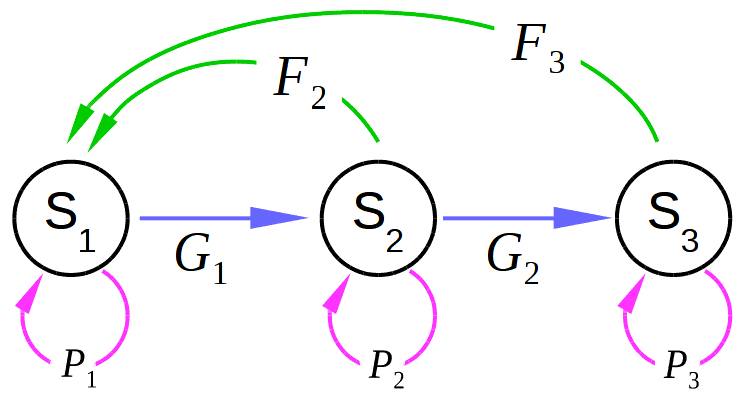 einfaches Modell eines größen-klassifizierenden Lebenszyklus-Graphen mit drei Zuständen